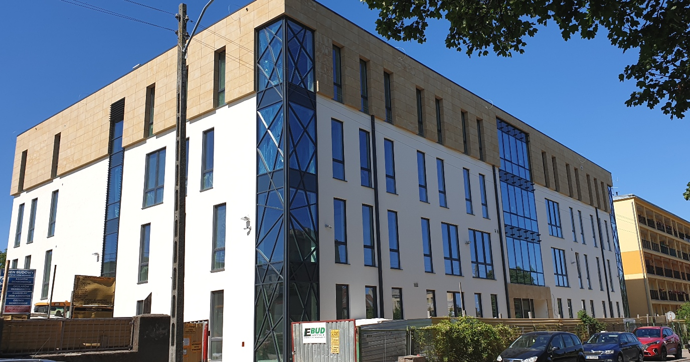 Stargard. Gmach nowego sądu